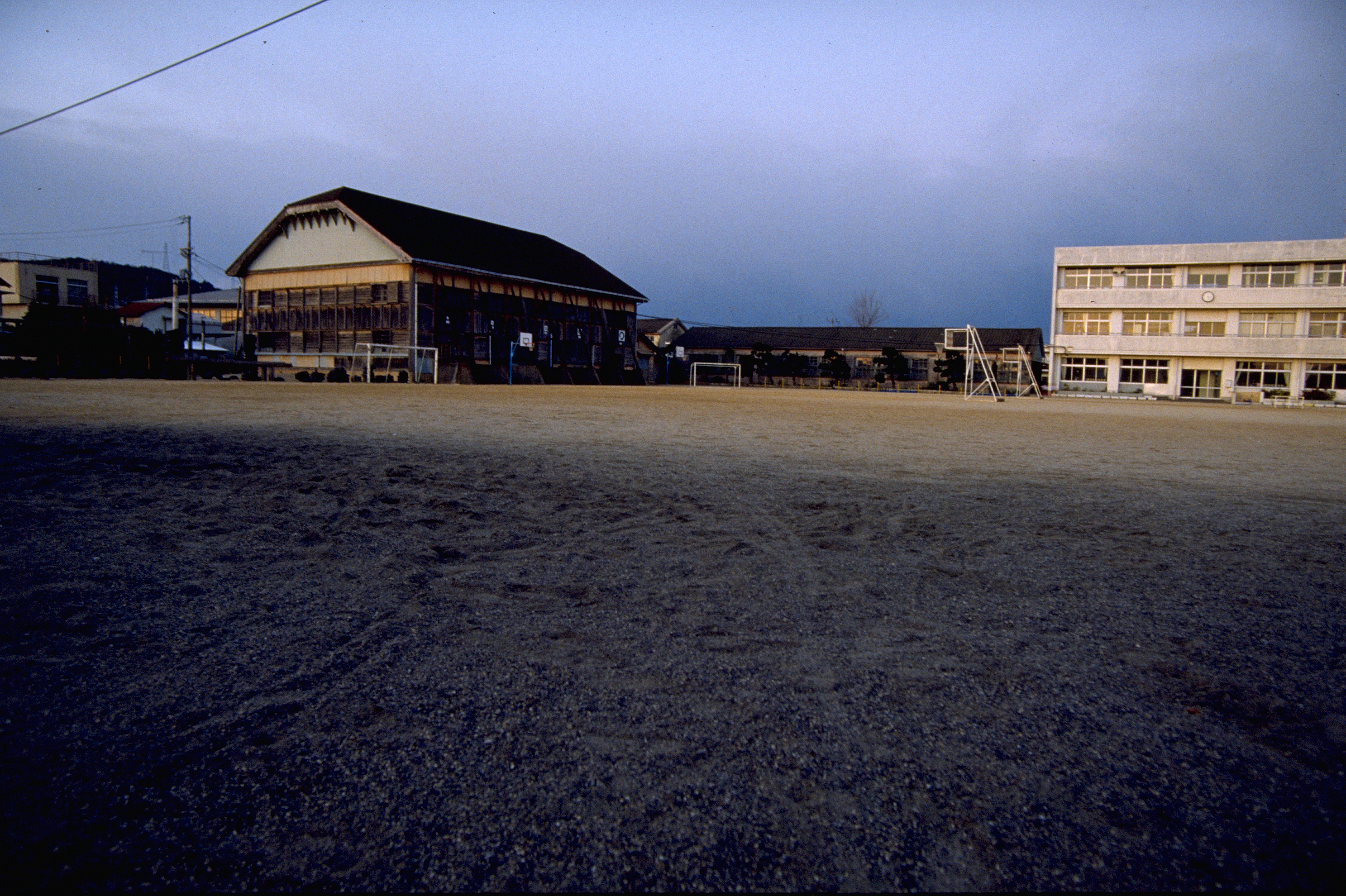 見能林小学校校庭